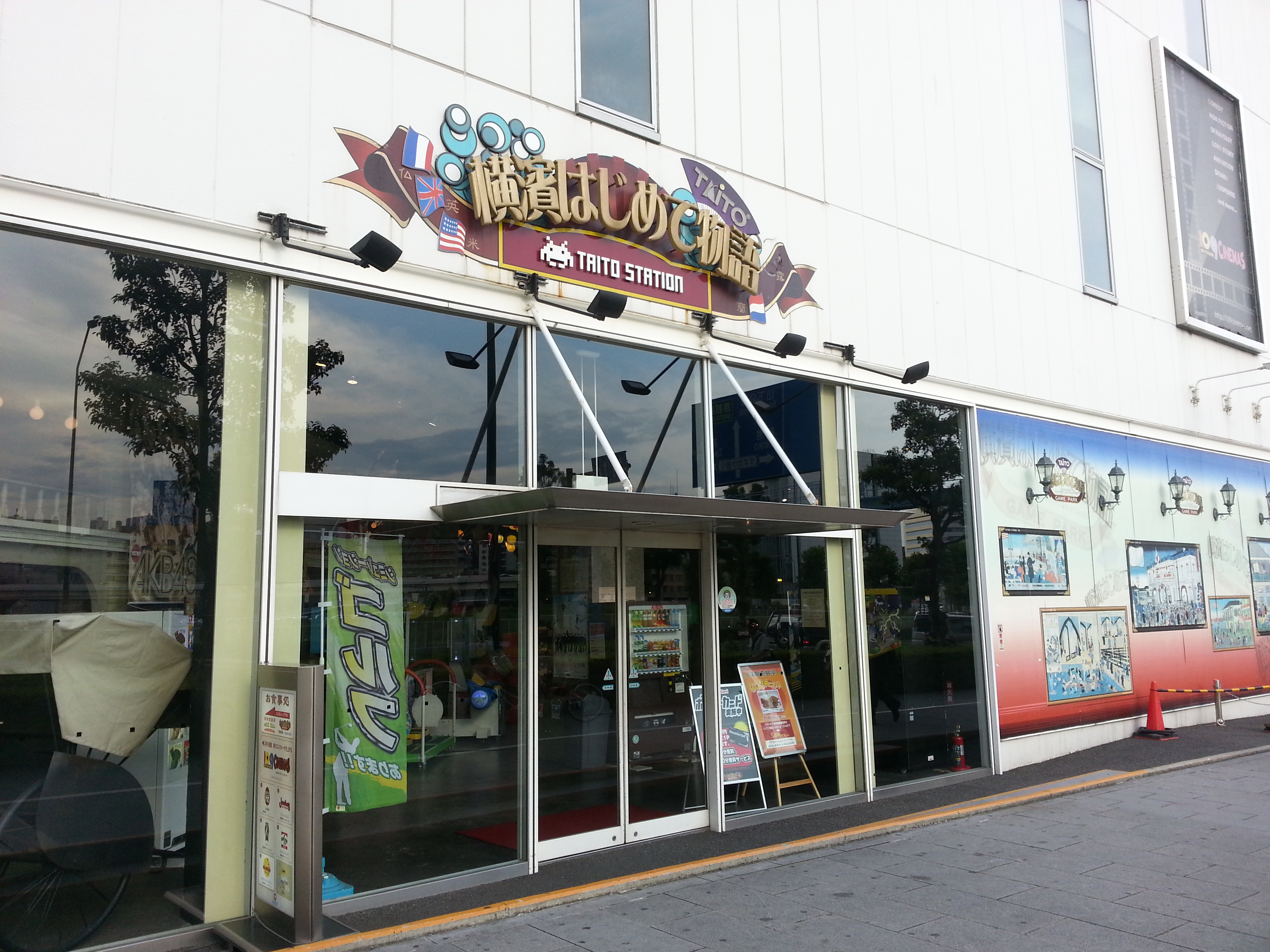 ゲントヨコハマのアミューズメント・レトロテーマパーク「横濱はじめて物語」の入口（みなとみらい大通り側）。ゲントヨコハマが暫定施設で2015年1月25日に閉鎖となったため、当施設も同日夜営業を終了（閉店）した。